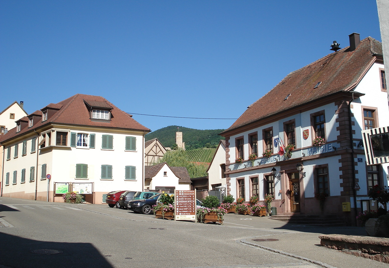 Katzenthal, près de Colmar (dép. du Haut-Rhin, Alsace, France). Mairie-école. À l'arrière-plan: vignoble du Schlossberg-Wineck et donjon du château ruiné du Wineck.